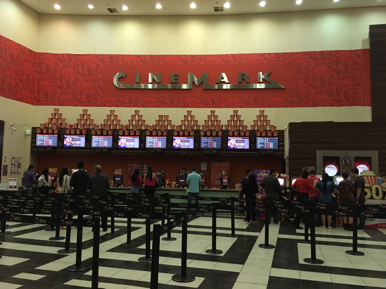 Bilheteria do Cinemark do Shopping Vitória